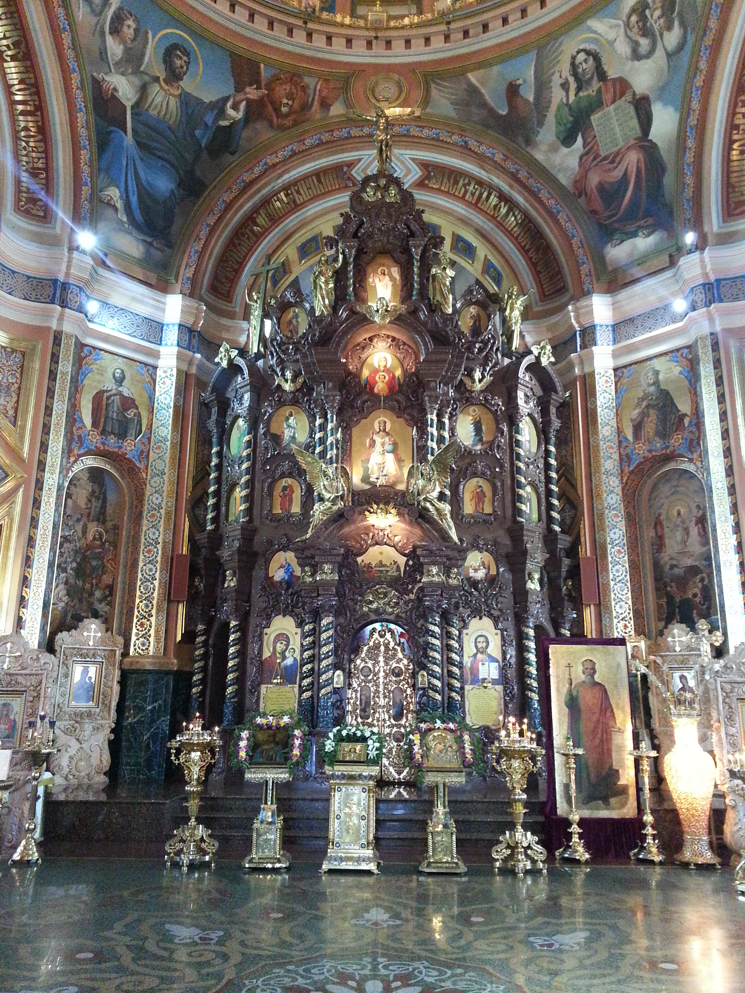 Казанская церковь: улица Баррикад, 34, Иркутск, Иркутская область